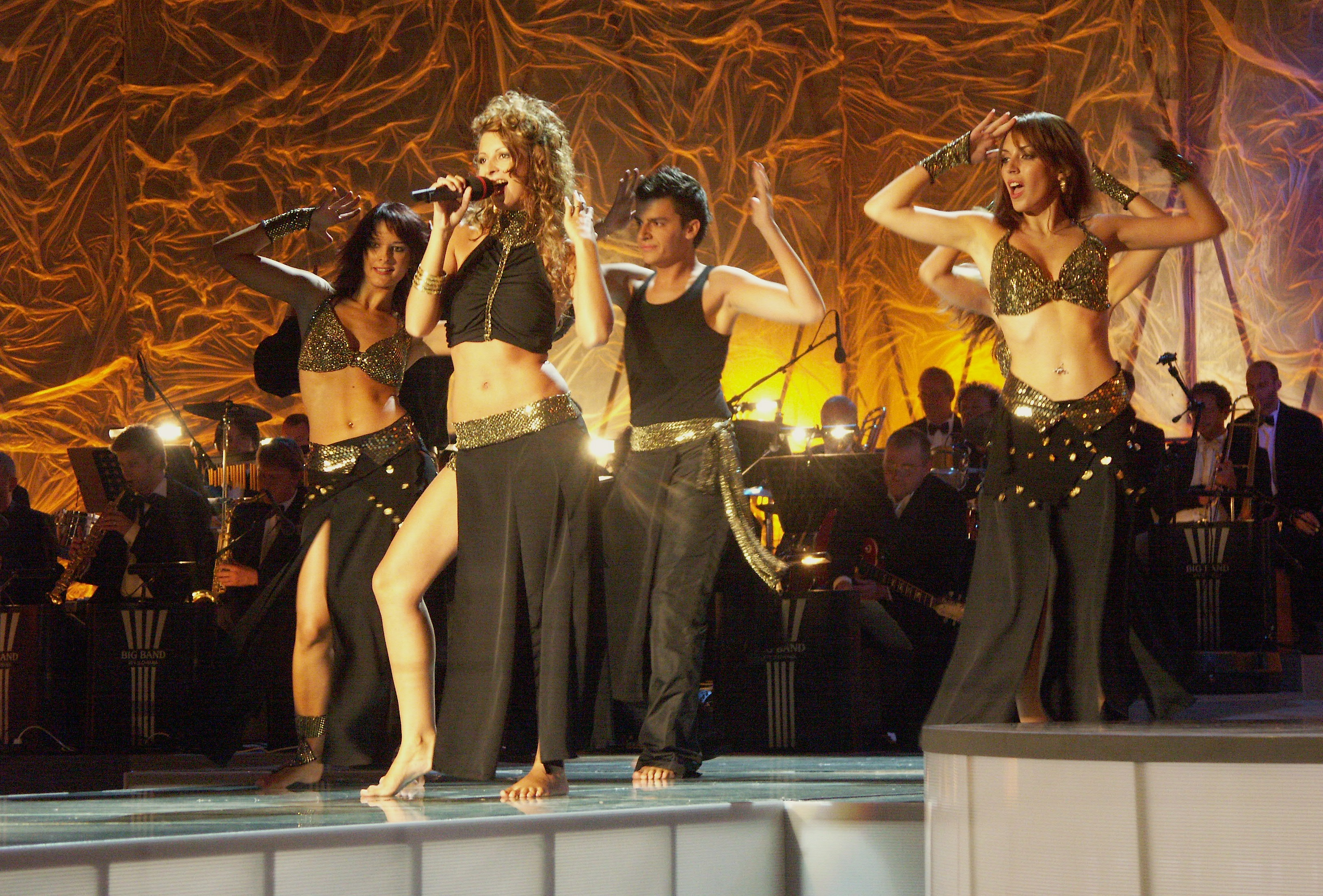 "Slovenska popevka" 2005, Žana in revijski orkester RTV Slovenija